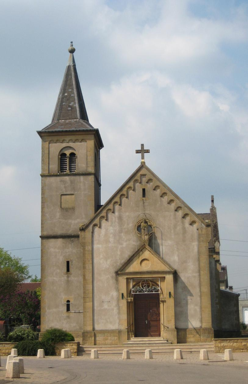 Eglise de Boussange